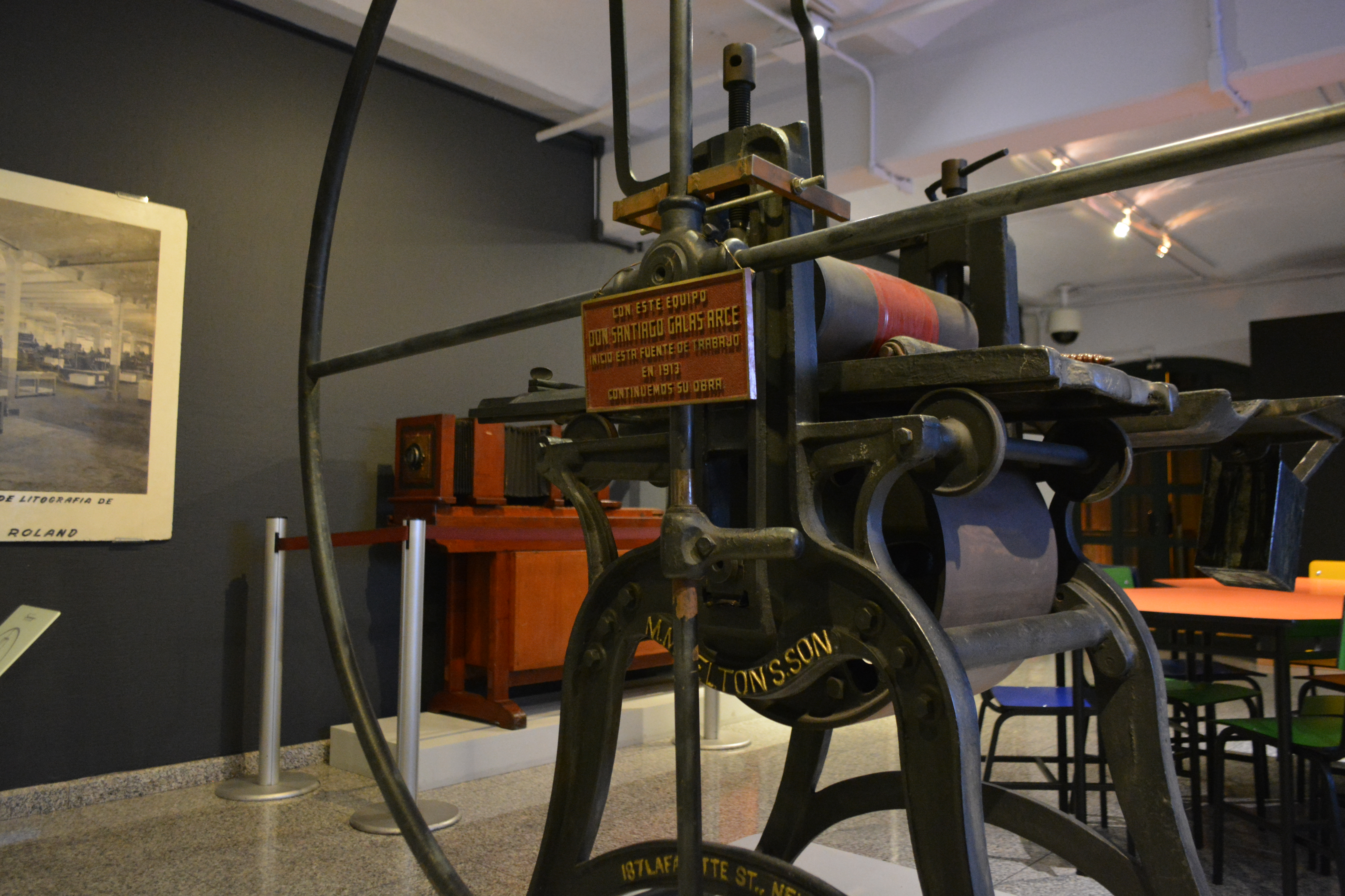 Vestíbulo del Museo Soumaya Plaza Loreto. Ciudad de México.